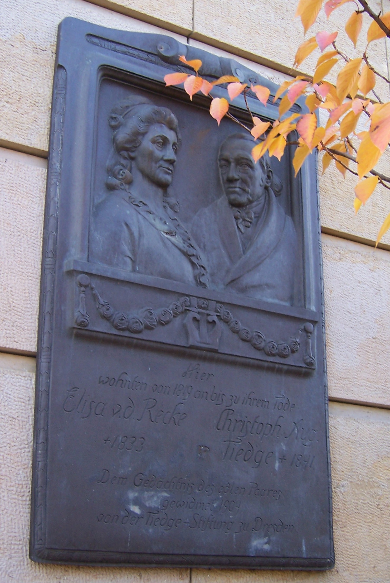 Plakette im Gedenken an Elisa von der Recke und Christoph August Tiedge an der Mauer des Hotel Bellevue in Dresden. Die Plakette markiert die ungefähre Lage des Wohnhauses der Schriftsteller.